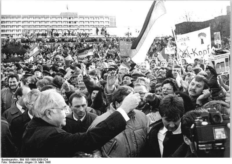 ADN-ZB Sindermann 9.3.1990 Le Rostock: Wahlkampf. Auf einer Wahlkampfkundgebung der "Allianz für Deutschland" wurde der Bundeskanzler der BRD, Helmut Kohl, von seinen Anhängern stürmisch begrüßt."